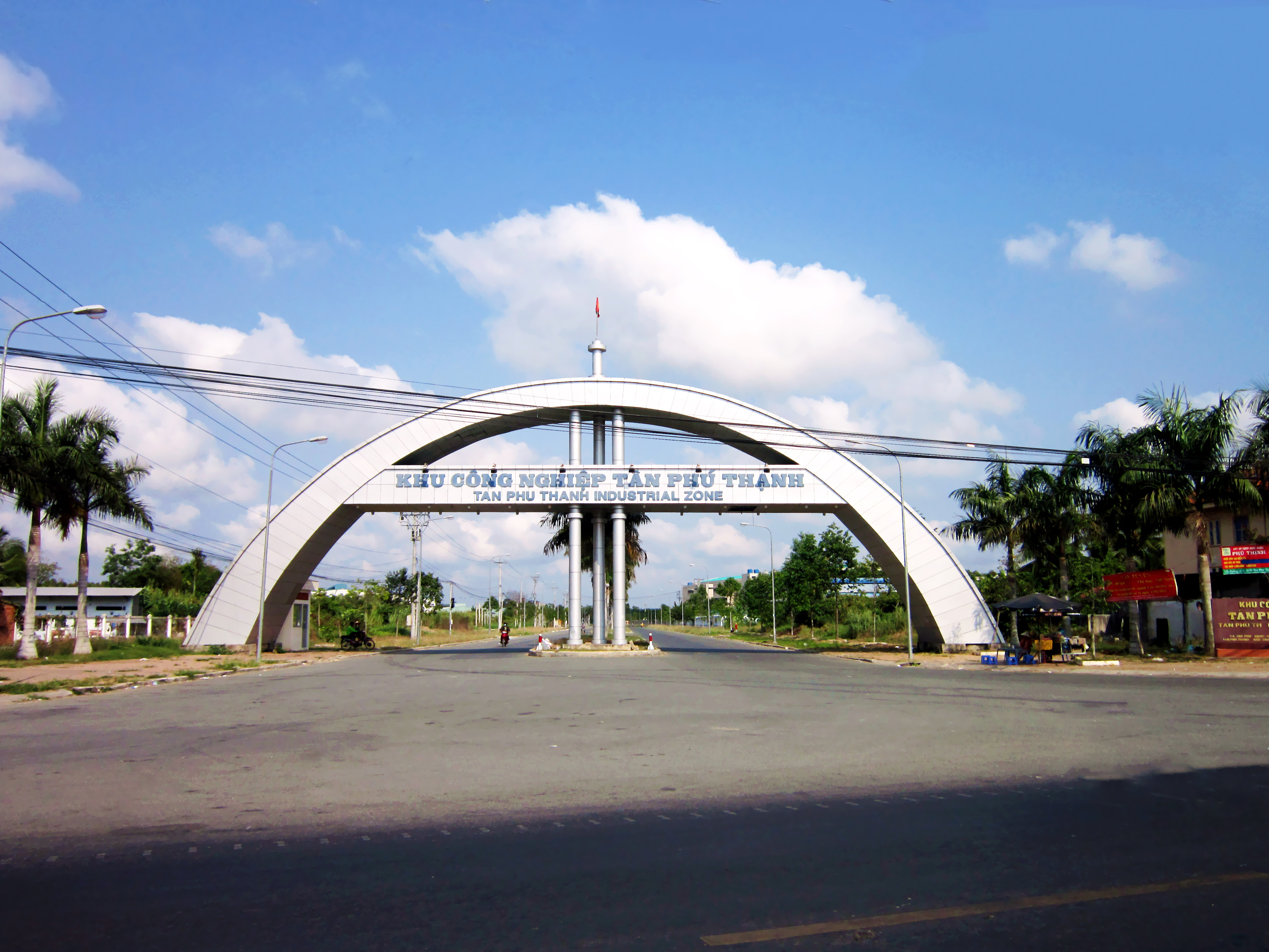 Khu công nghiệp Tân Phú Thạnh ở xã Tân Phú Thạnh, thuộc huyện Châu Thành A, tỉnh Hậu Giang, Việt Nam.